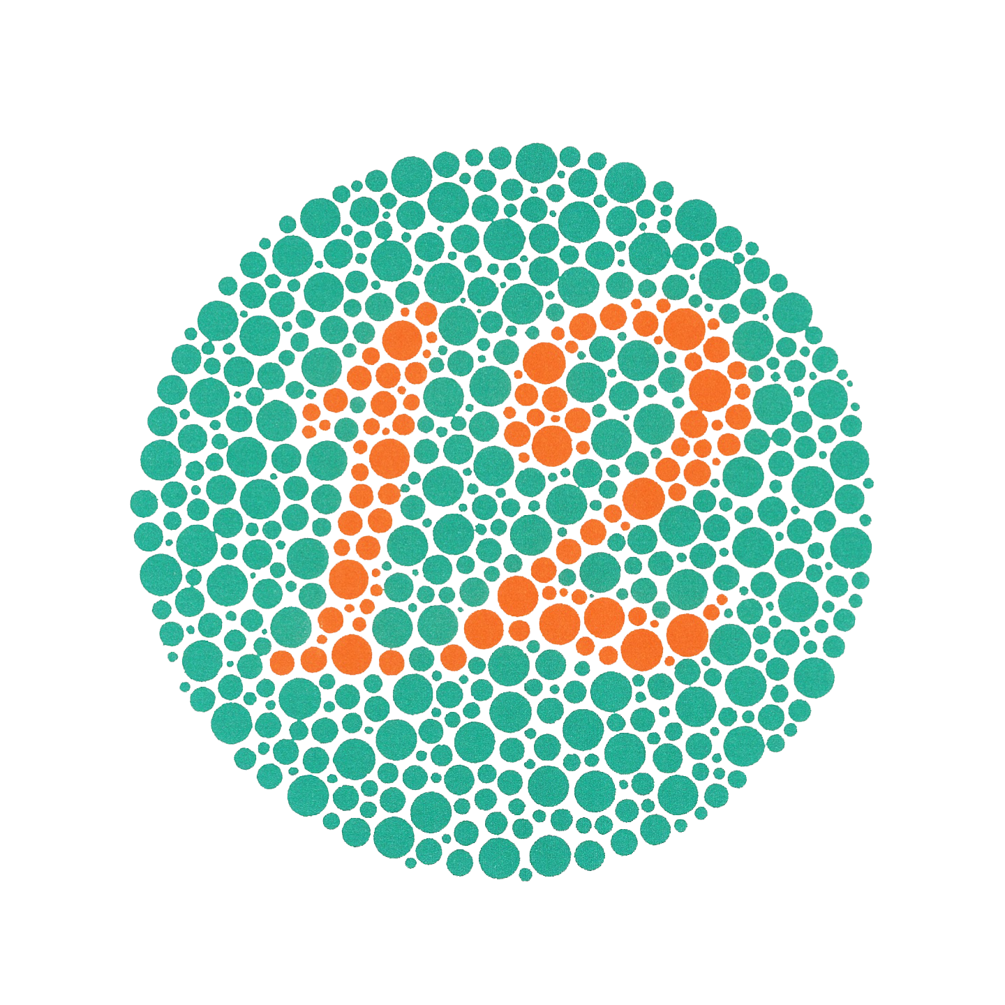 Ishihara Plate 1